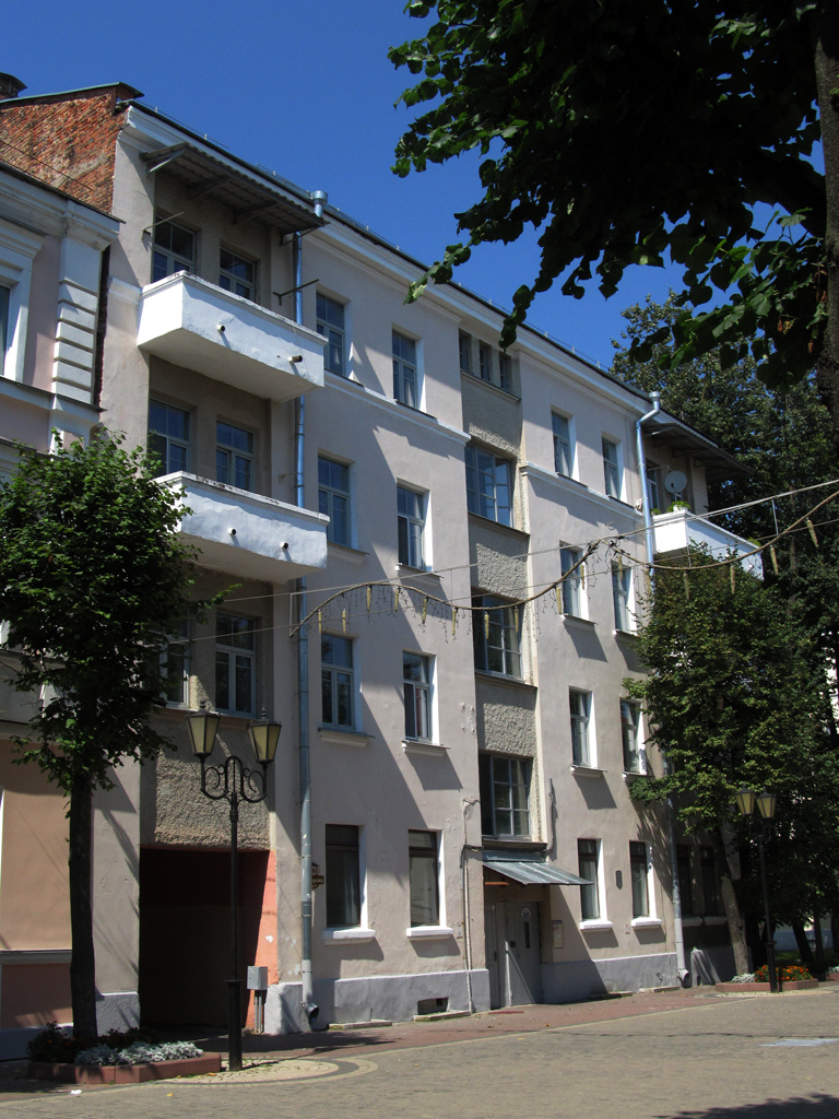 Віцебск. Вуліца Суворава, 38